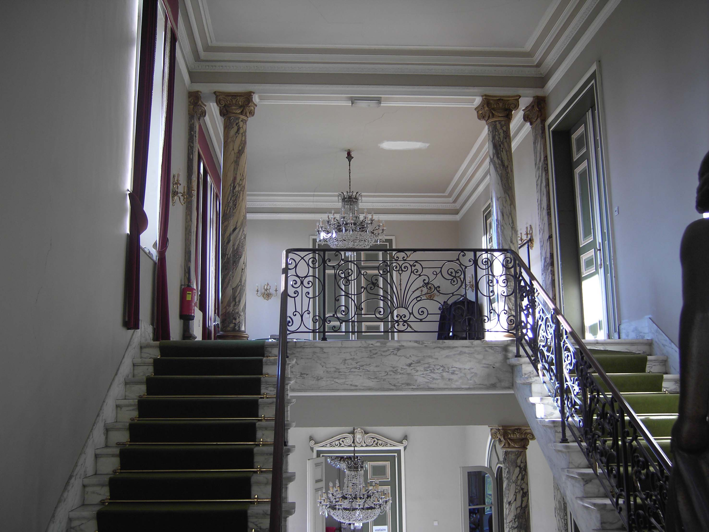 Secretariaat Festival van Vlaanderen - bovenverdieping Kasteel Borluut - Sint-Denijs-Westrem - Gent - Oost-Vlaanderen - België